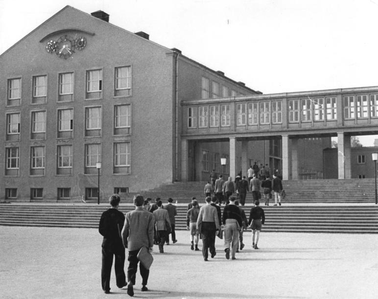 Dresden, Technische Hochschule Zentralbild Höhne-Pohl 26.5.1956 Dresden - Zur 750-Jahr-Feier - Anfang Juni 1956 UBz: Die Technische Hochschule Dresden ist die größte Technische Hochschule Mittel- und Westeuropas. An ihr studieren 8500 junge ABF-Studenten. Blick auf eines der zahlreichen Institute des Mathematisch-physikalsichen Instituts am Zelleschen Weg. Information added by Wikimedia users.Zentralbild Höhne-Pohl 26.5.1956 Dresden - Zur 750-Jahr-Feier - Anfang Juni 1956: Blick auf das Hörsaalgebäude des Mathematisch-Physikalischen Instituts der Technischen Hochschule Dresden am Zelleschen Weg (heute: Technische Universität Dresden, Trefftz-Bau, Zellescher Weg 16)